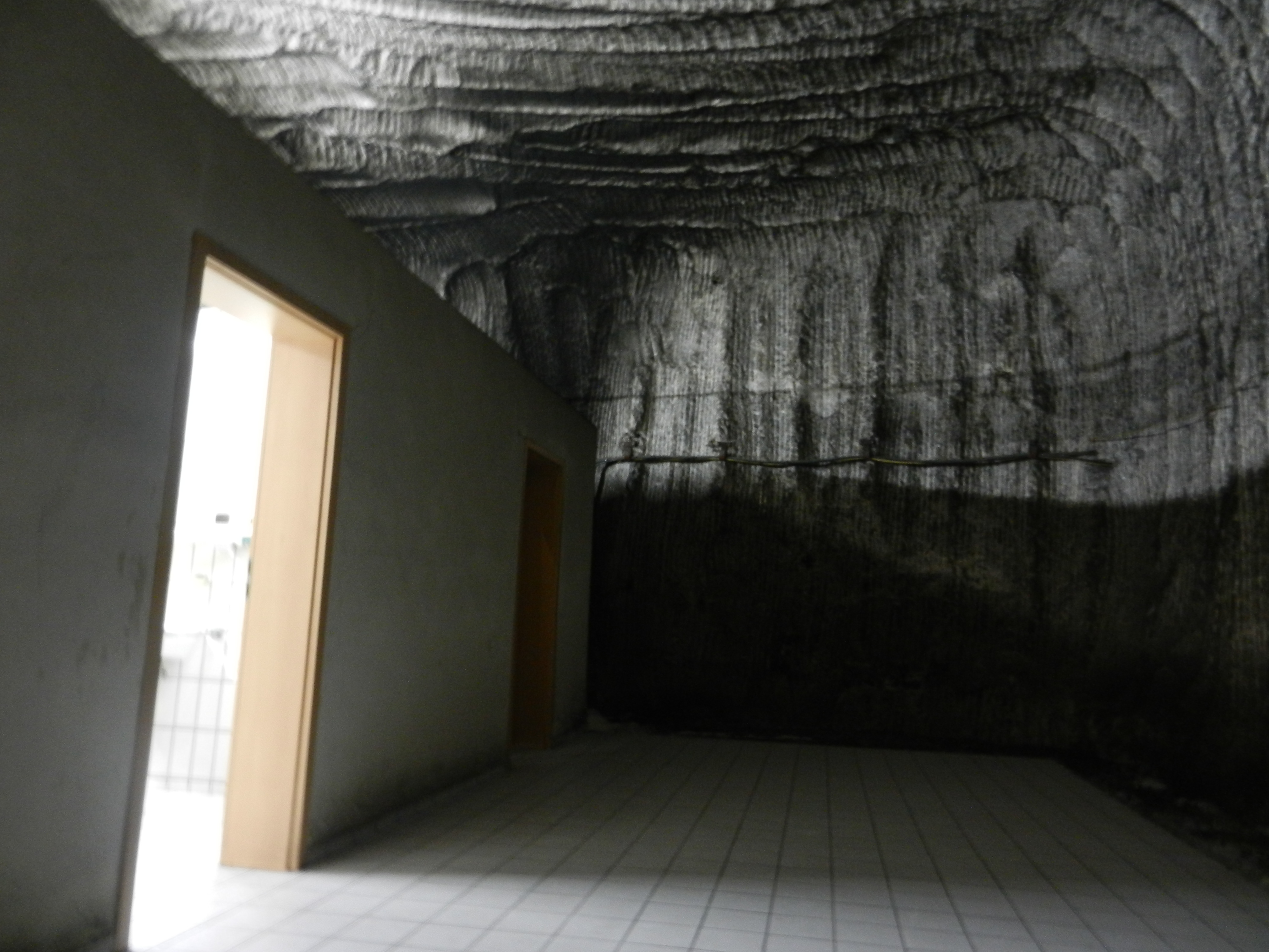 Salzbergwerk Stetten bei Haigerloch, Toilette